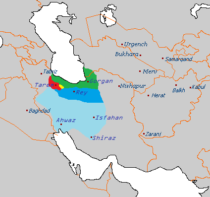 سه متحد در سال 320 هجری: مرداویج، سالار و ماکان